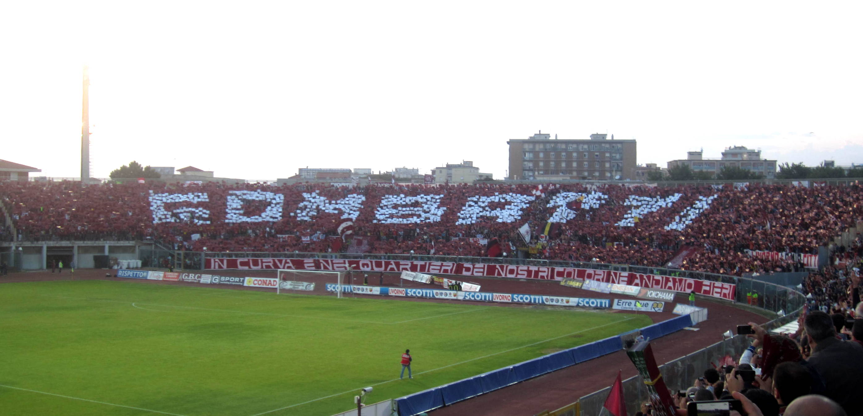 Curva Nord allo Stadio Picchi di Livorno